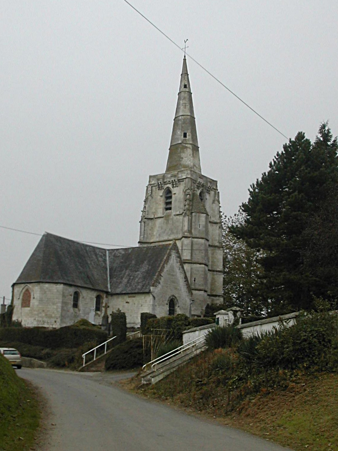 Église de Ligny-Saint-Flochel